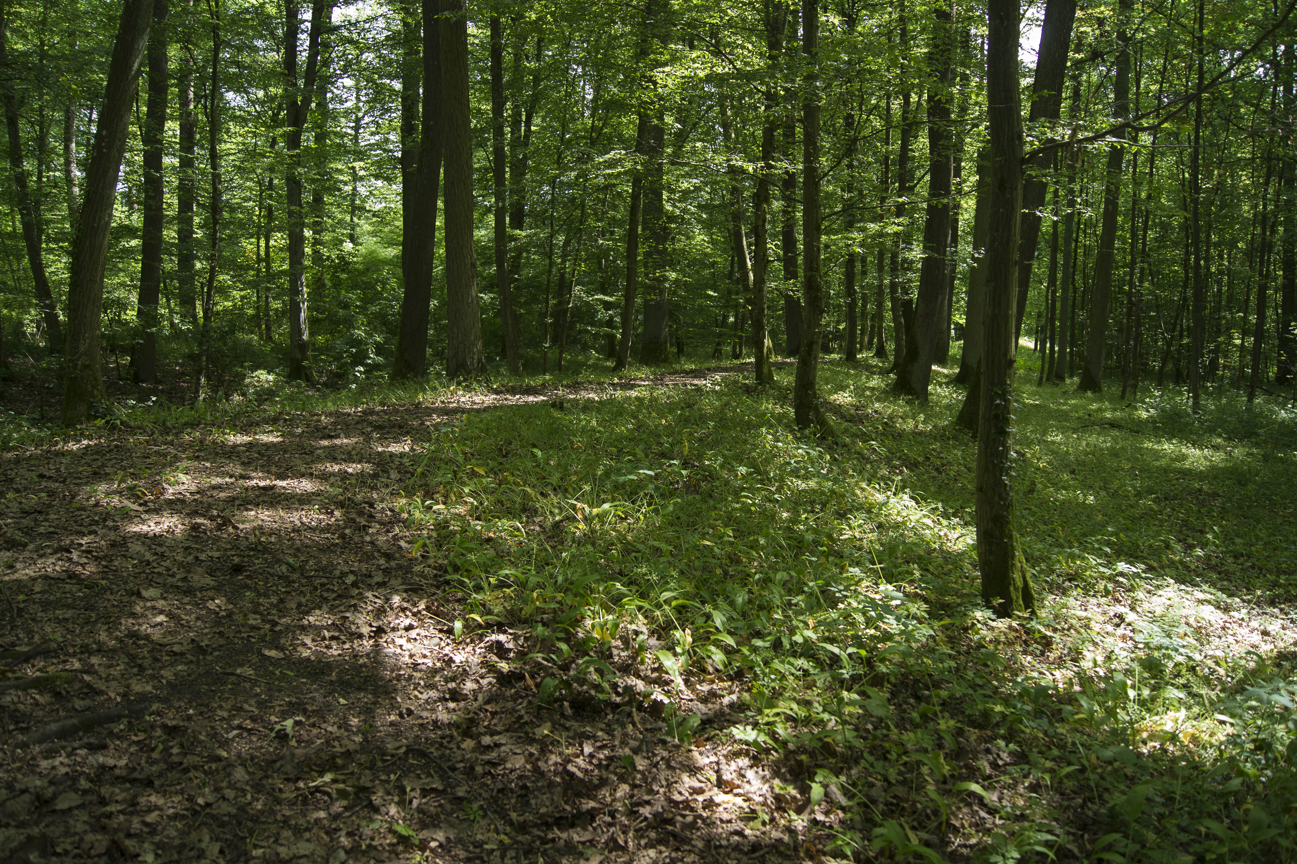 Weg auf dem ehmaligen Wall der Viereckschanze